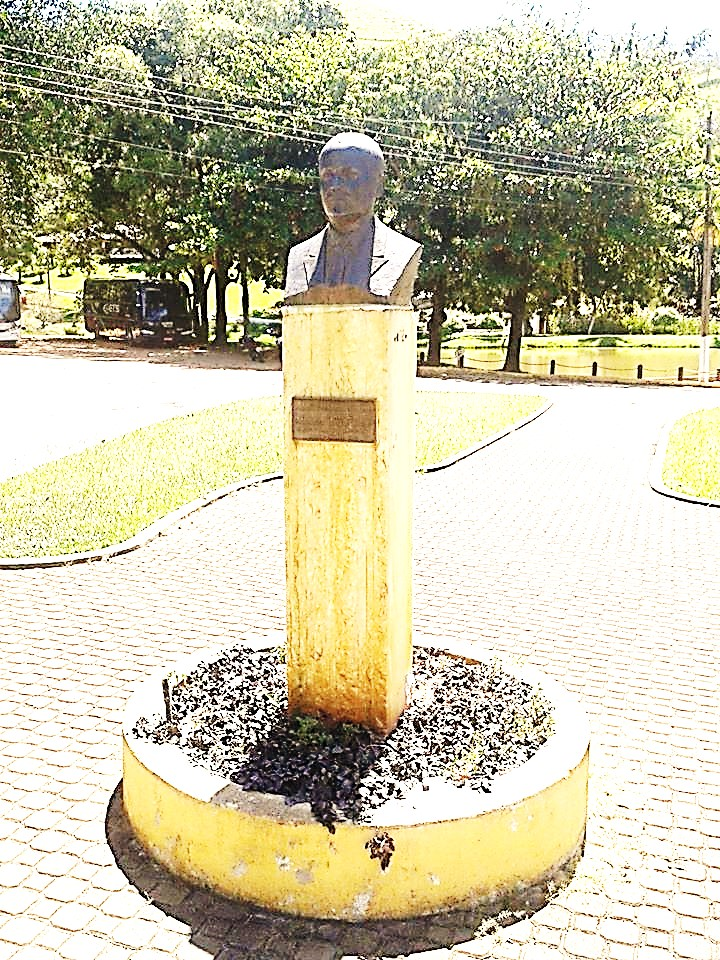 Augusto Maria Martinez Toja, empresário, banqueiro e industrial. Sócio-proprietário do antigo Banco Fluminense da Produção e dono do Hotel Fazenda e Fontanário Raposo; apontado como um dos responsáveis pelo desenvolvimento da localidade de Raposo/RJ, uma das estâncias hidrominerais mais procuradas no Estado do Rio de Janeiro como destino turístico.